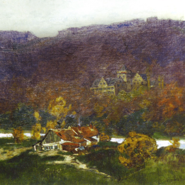 Dieses Bild zeigt einen Ausschnitt des Gemäldes (randlich etwas beschnitten). Die vom Maler gewählte Perspektive stimmt nicht mit der realen Lage der Gebäude im Gelände an der Ruhr überein.